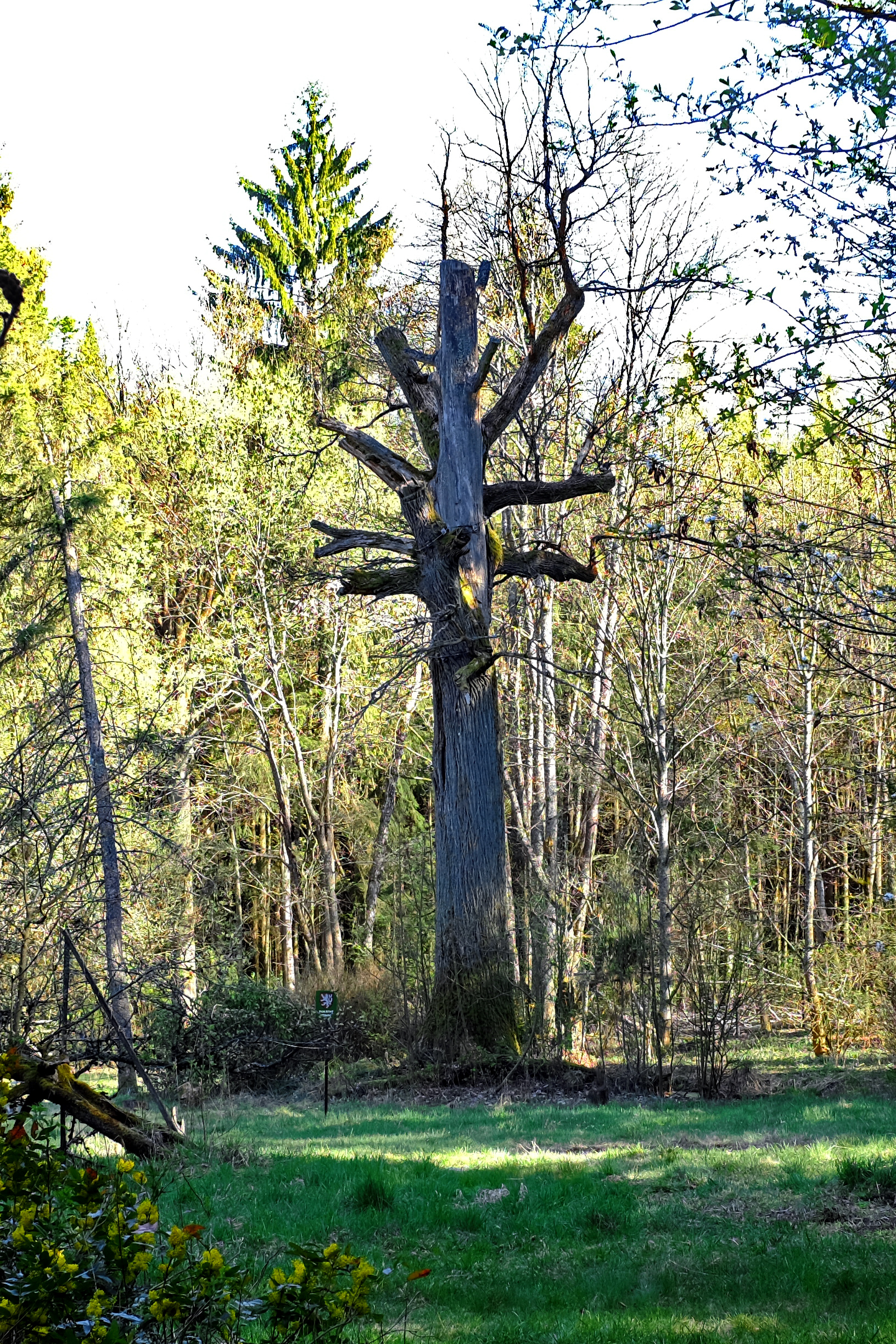 Památný strom - Dub letní v Chodovské Huti - Chodovská Huť, část obce Tři Sekery, okres Cheb